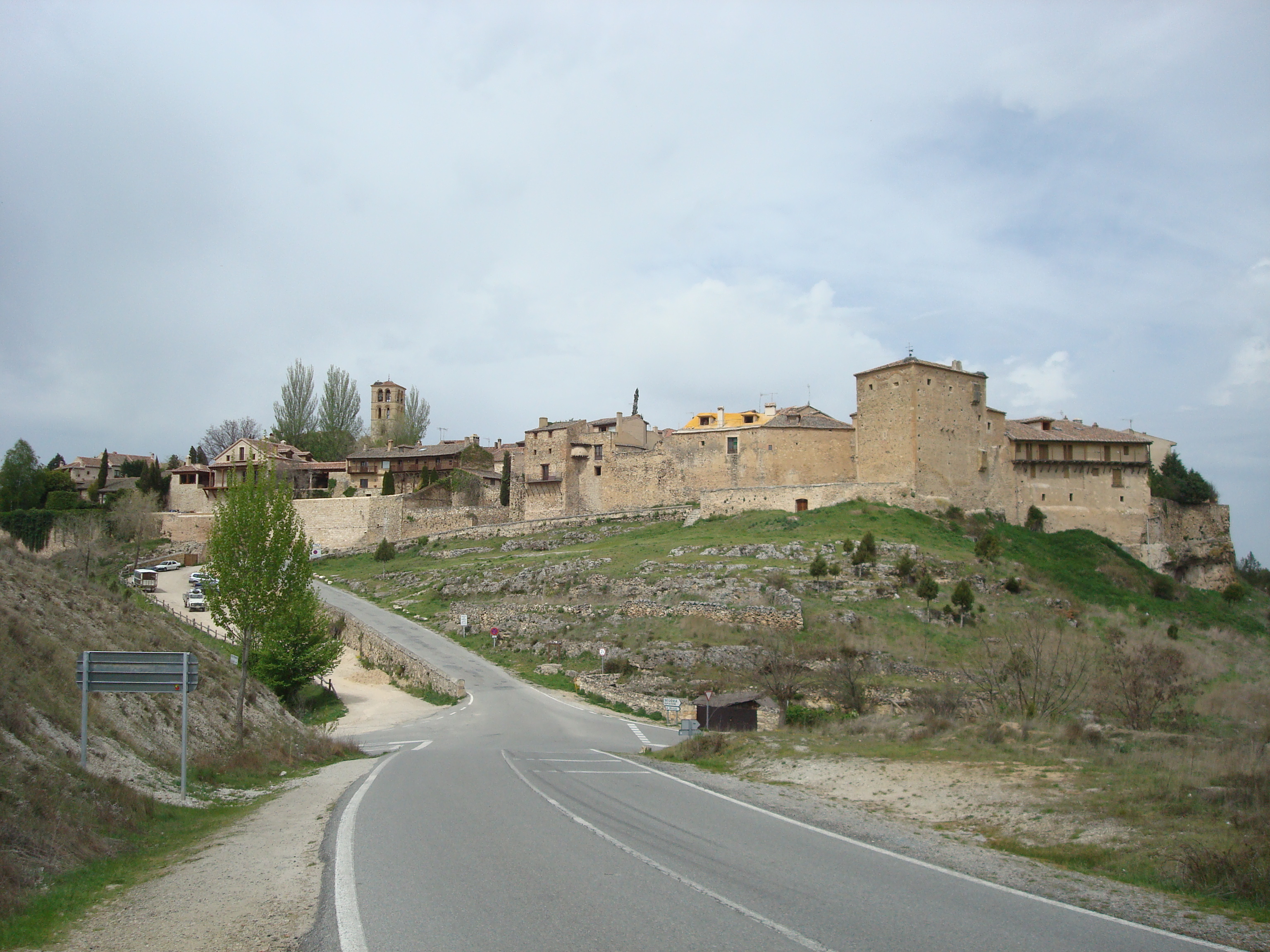 Pedraza - 001